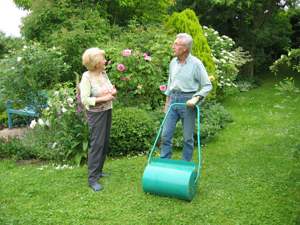 Jardin botanique à la Faulx de Dole en Franche Comté - France